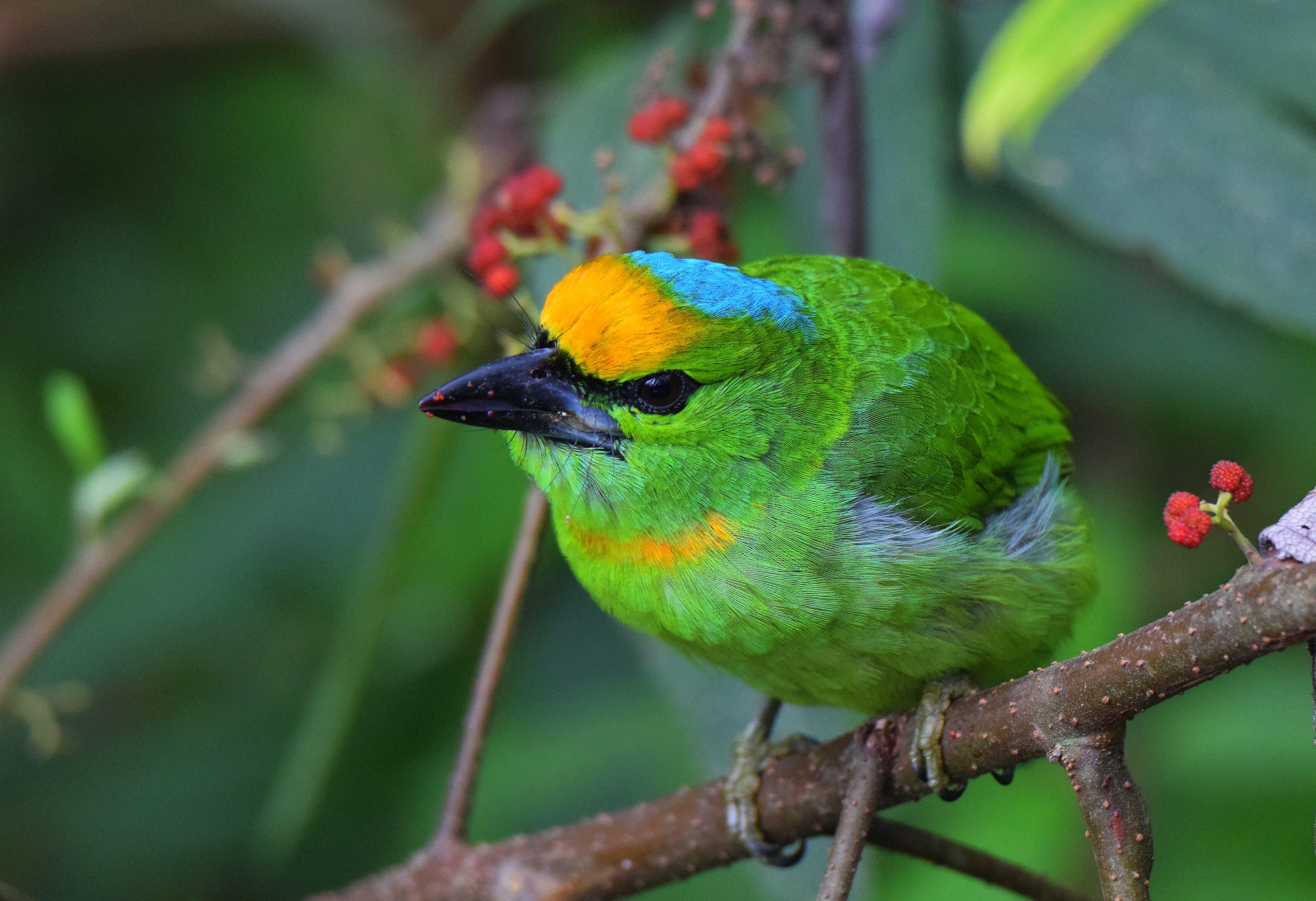 Takur Tohtor atau Flame-fronted Barbet (Megalaima armilaris) burung endemik pulau Jawa dan Bali.